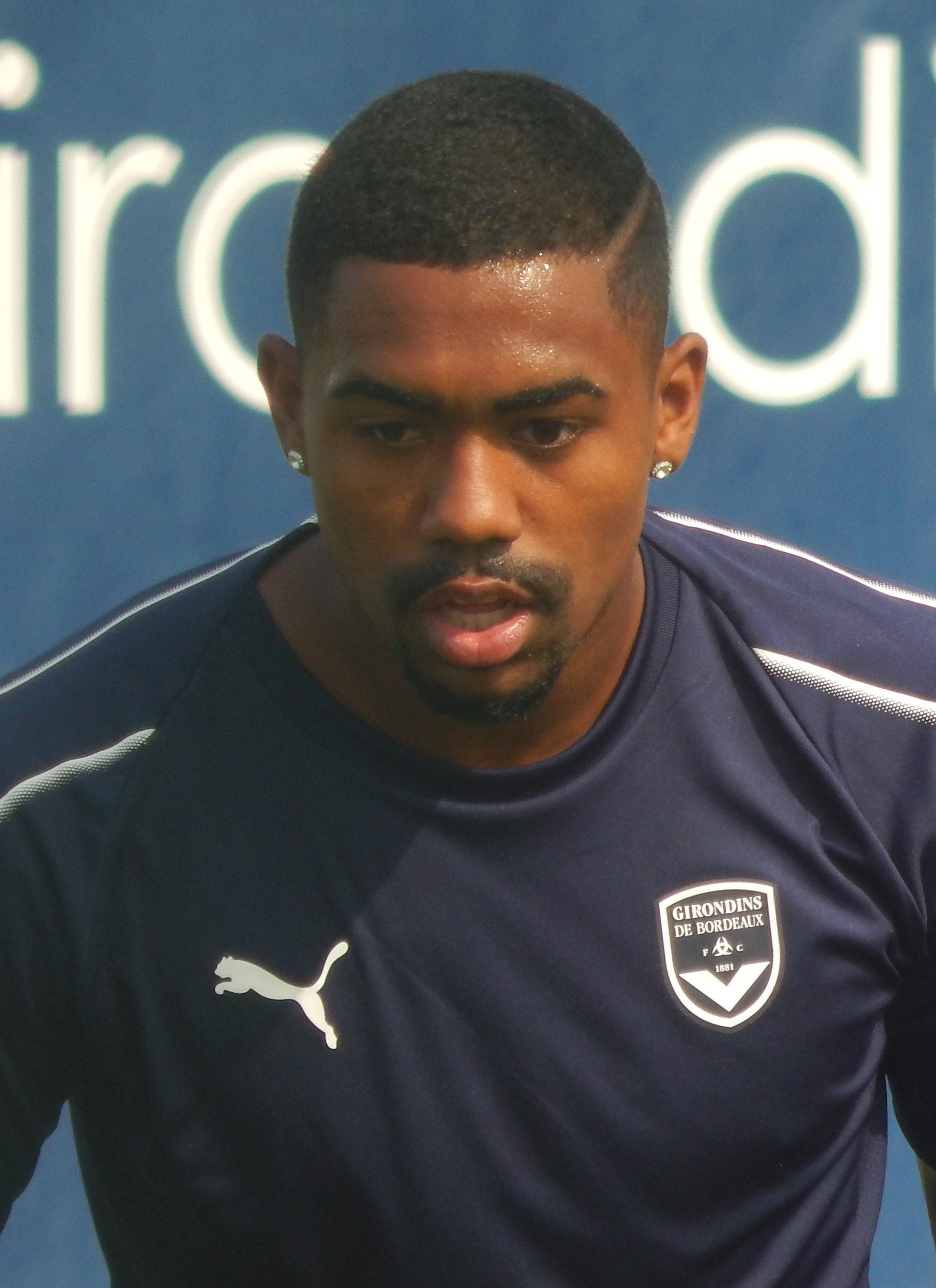 Malcom à l'entraînement avec les Girondins de Bordeaux le 19 juillet 2018.